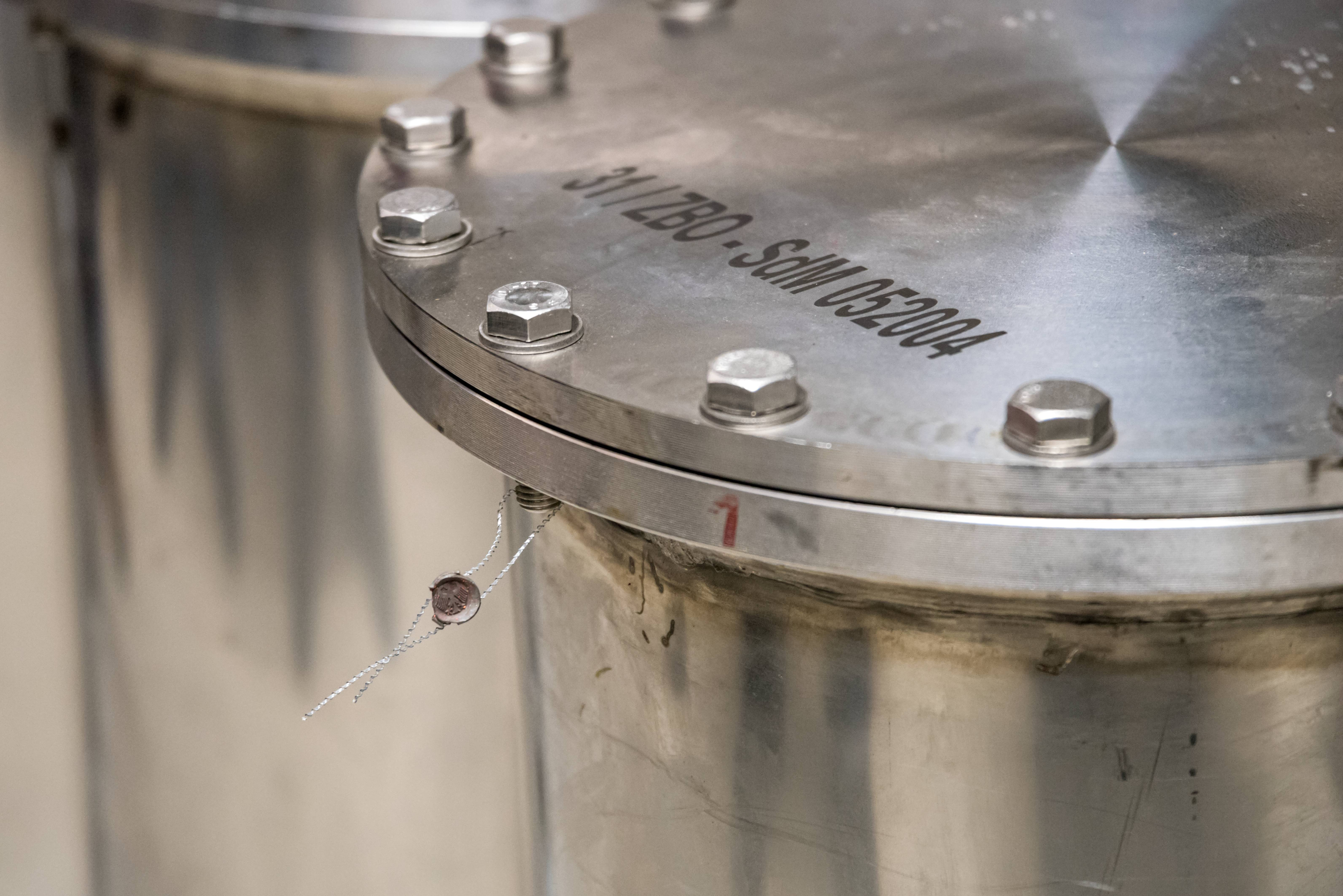 Der Barbarastollen ist der Zentrale Bergungsort der Bundesrepublik Deutschland zur Lagerung von fotografisch archivierten Dokumenten mit hoher national- oder kulturhistorischer Bedeutung. Er ist in Europa das größte Archiv zur Langzeitarchivierung. Die Bilder sind im Rahmen einer Führung des Bundesamts für Bevölkerungsschutz und Katastrophenhilfe (BBK) entstanden - Wikipedia Stammtisch,das 113. Treffen am 30. Mai 2016 Eine Plombe am Behälter 31 Die Behälter der "Subduktive Maßnahmen ZBO - SdM 052004". Es wurden Werke von 50 Künstlern eingelagert Diese sind auch die einzigen Behälter die auch verplomt sind. Sie dürfen in 1500 Jahren also im Jahre 3504 eingesehen werden.